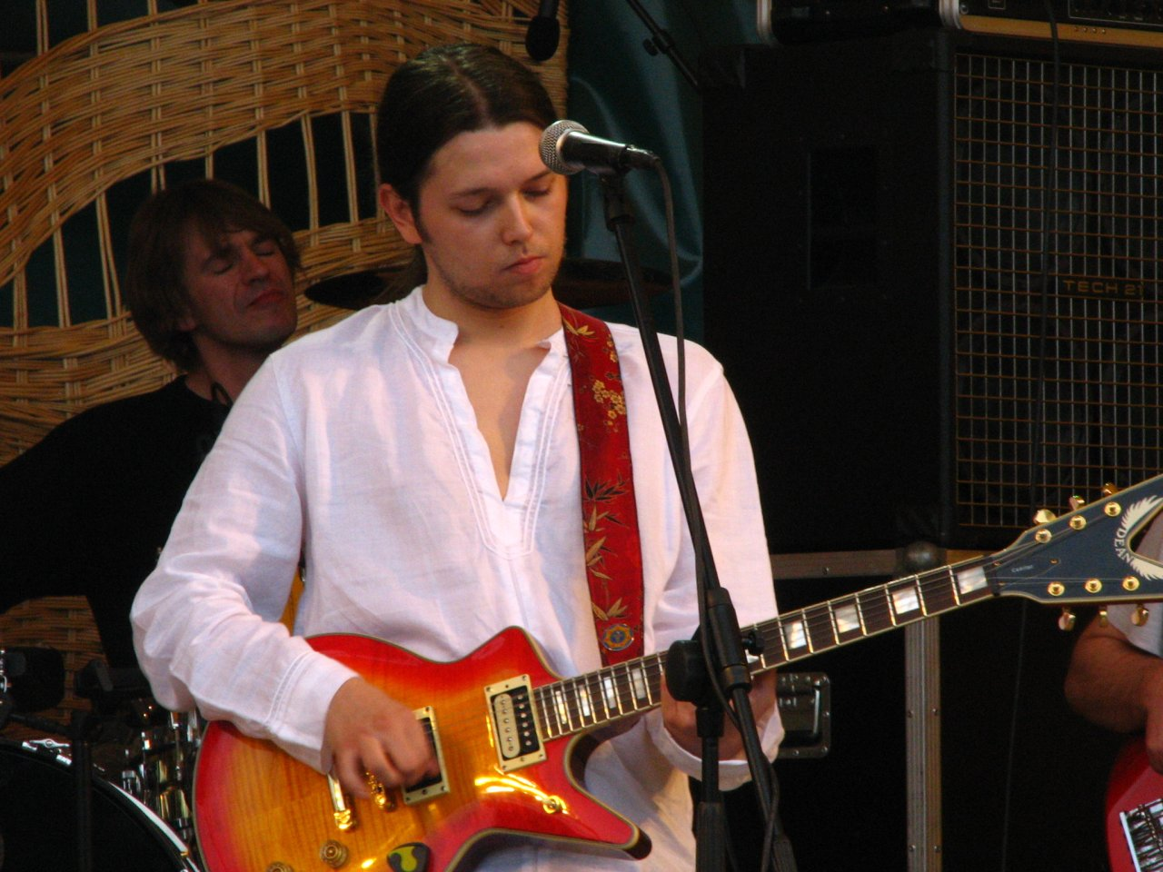 Gabriel Fleszar (w tle na perkusji - Sergiusz Supron) na koncercie w Rudniku nad Sanem 20 kwietnia 2006 roku (wykonane przez Łukasza F. z Niska - )